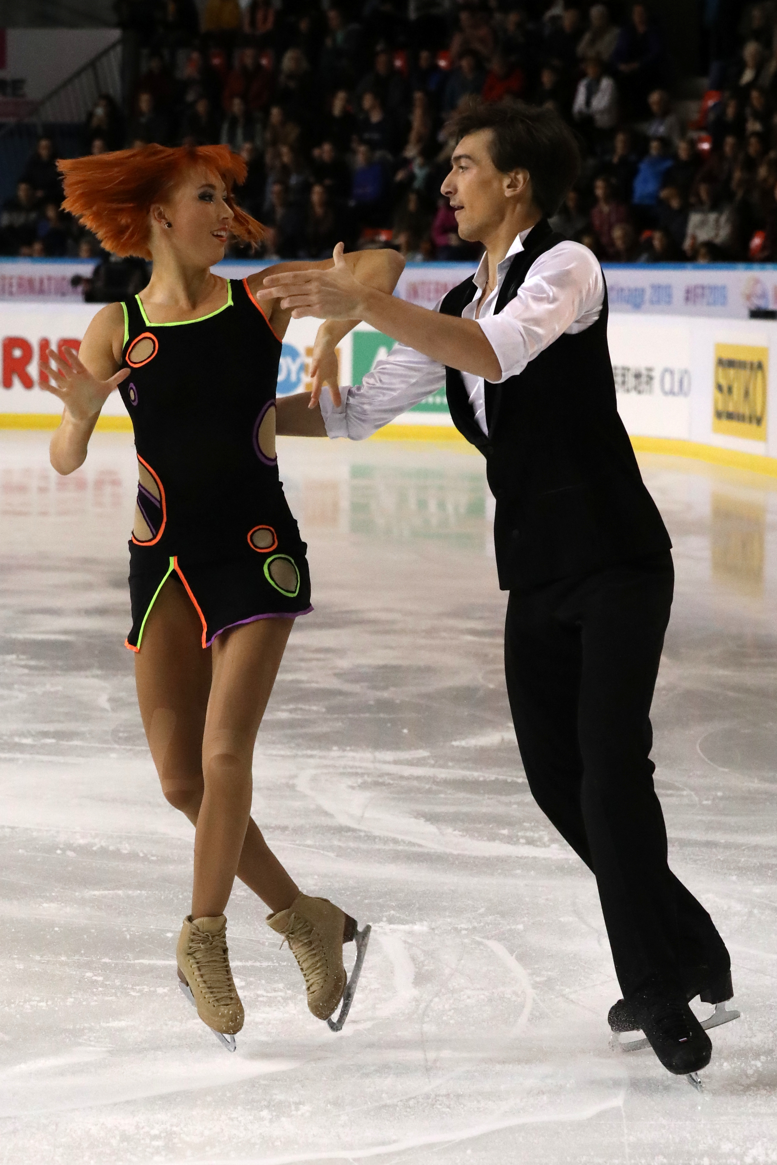 Zagorski et Guerreiro, programme court aux Internationaux de France de patinage 2019